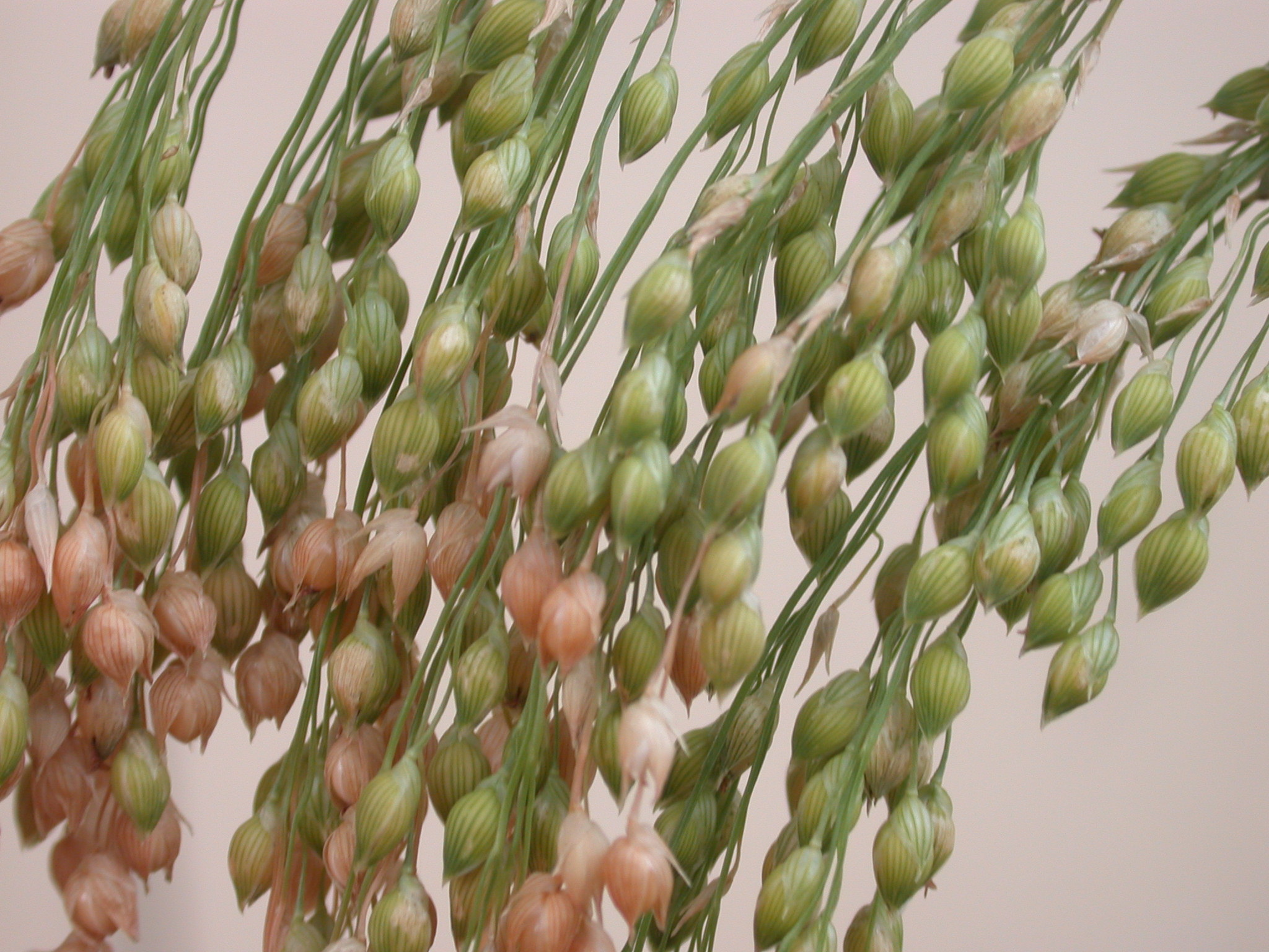 Millo painzo